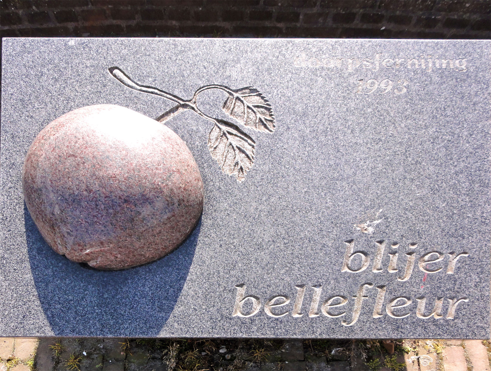 Blijer Bellefleur door Frans Ram in Blija